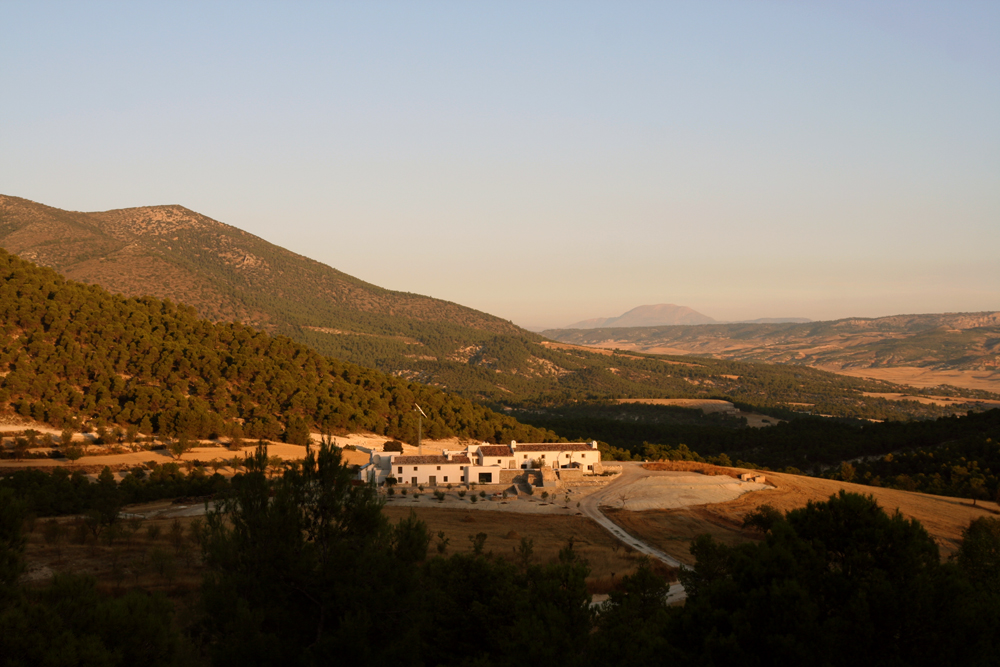 La Cortijada Los Gázquez (Almería, España)